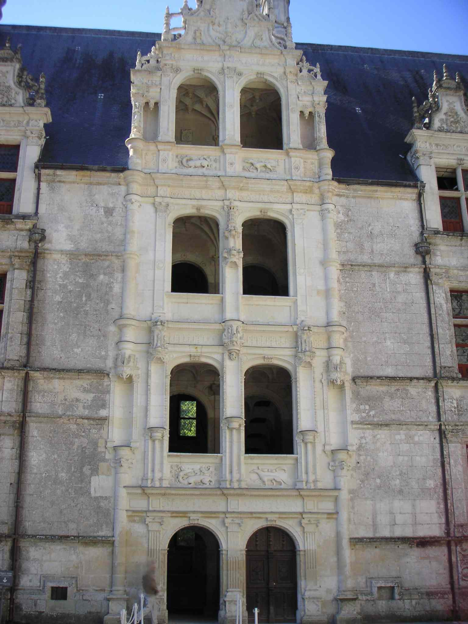 Vue de la façade et des loggias donnant sur l'escalier du château d'Azay-le-Rideau, Indre-et-Loire, France, prise par mes soins.